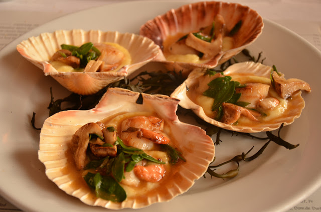 Yelpiyəbənzər balıqqulağı